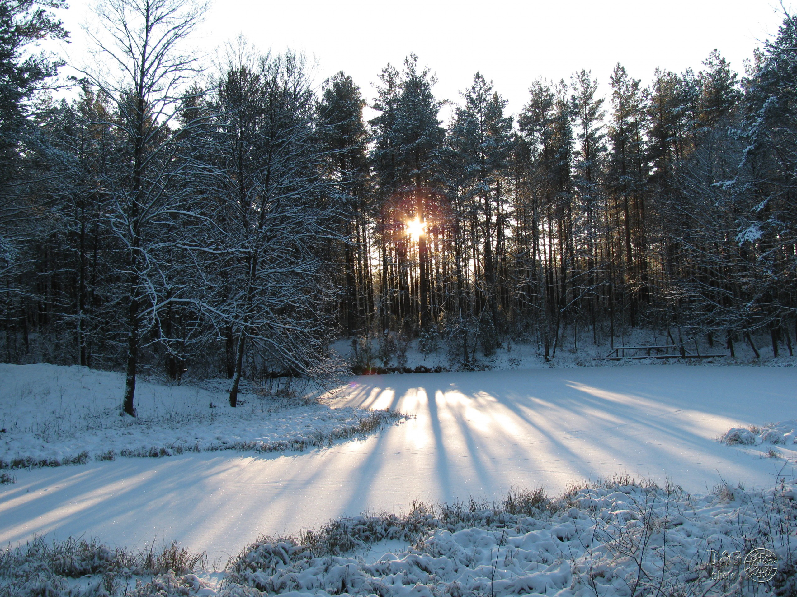 Winter river in Marcinkonys / Зимняя радость